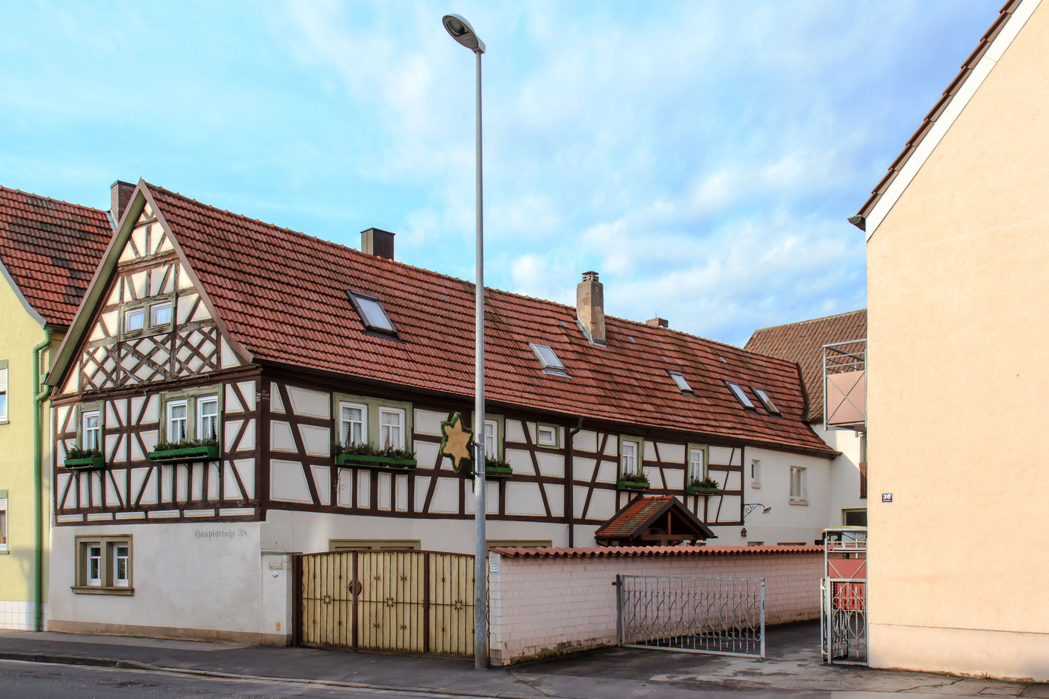 Baudenkmal D-6-78-178-2